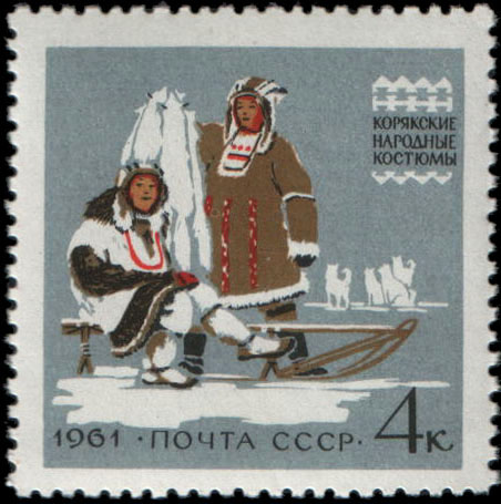 Корякские народные костюмы. Художник: В. Пименов. Марка СССР, номинал - 4коп.